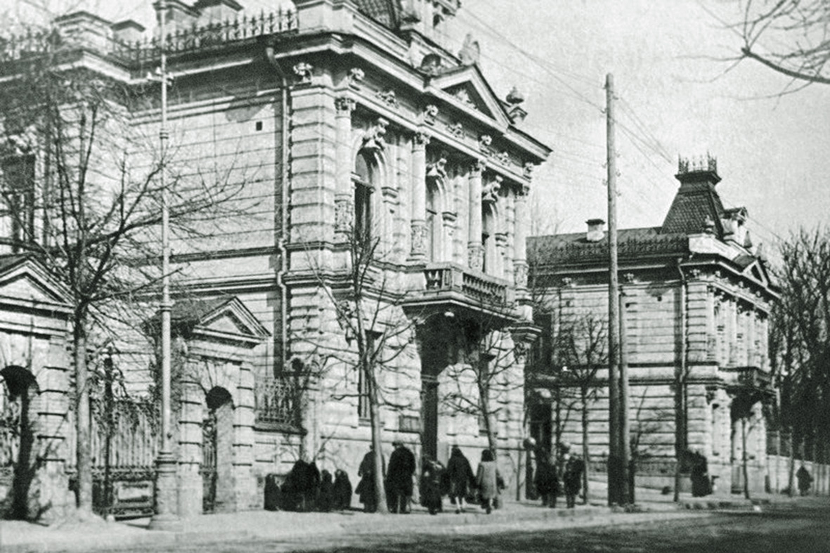 Особняк С. Лібермана, Київ, Банкова вул., 2